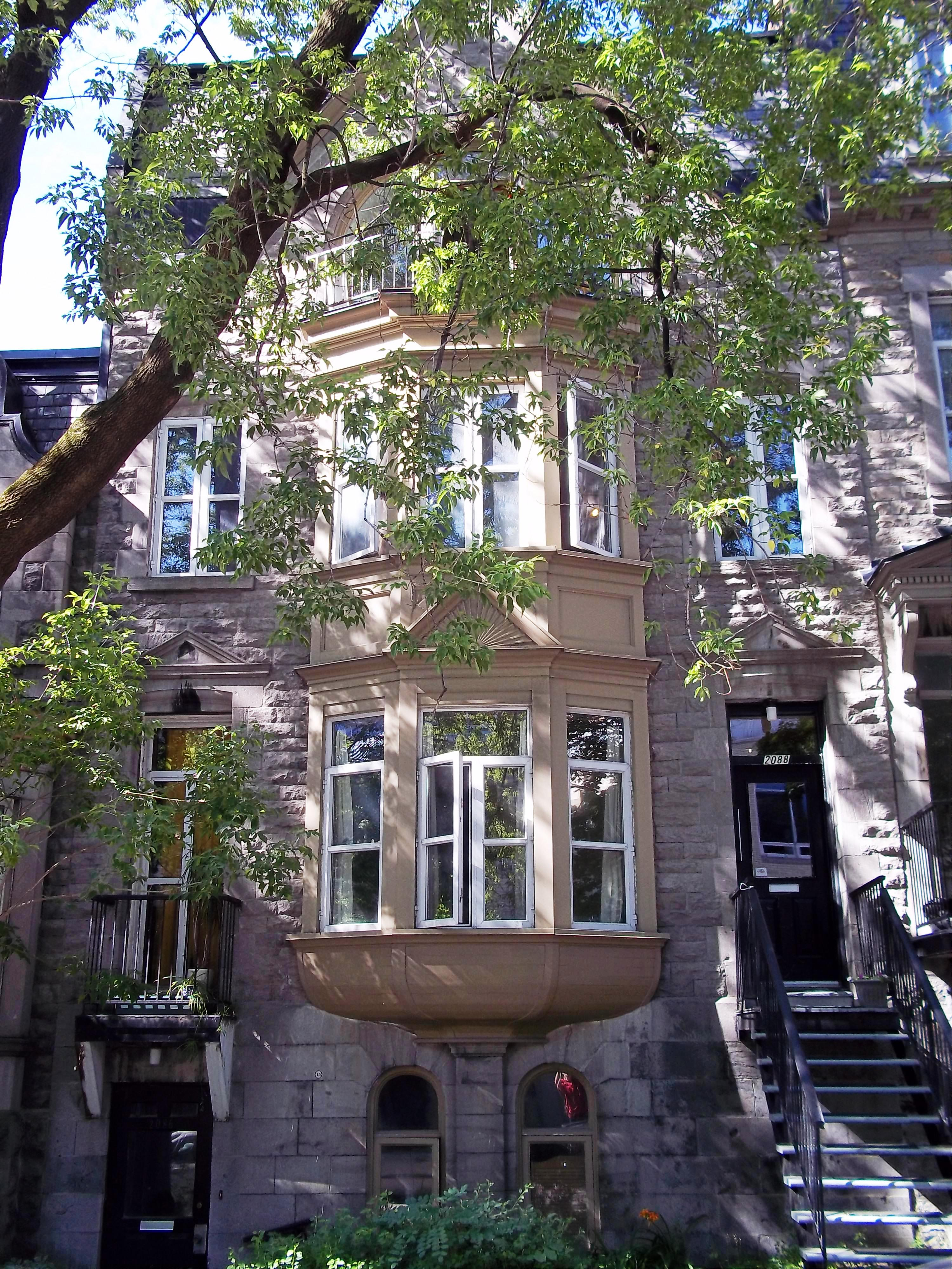 Maison Victoria J.-Prentice, 2086-2088, rue Jeanne-Mance, Montréal